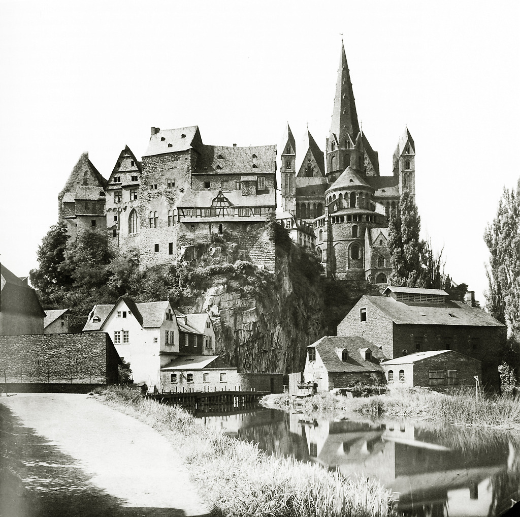 Der Limburger Domberg, nach 1873.